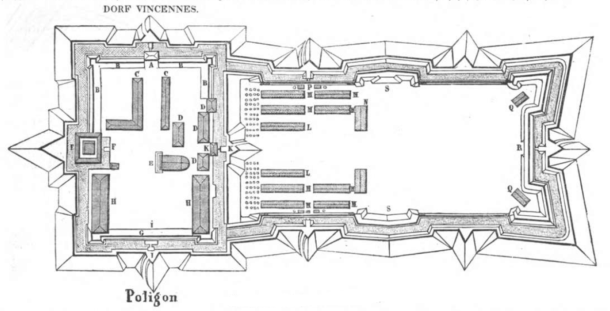 Grundriß des Forts Vincennes